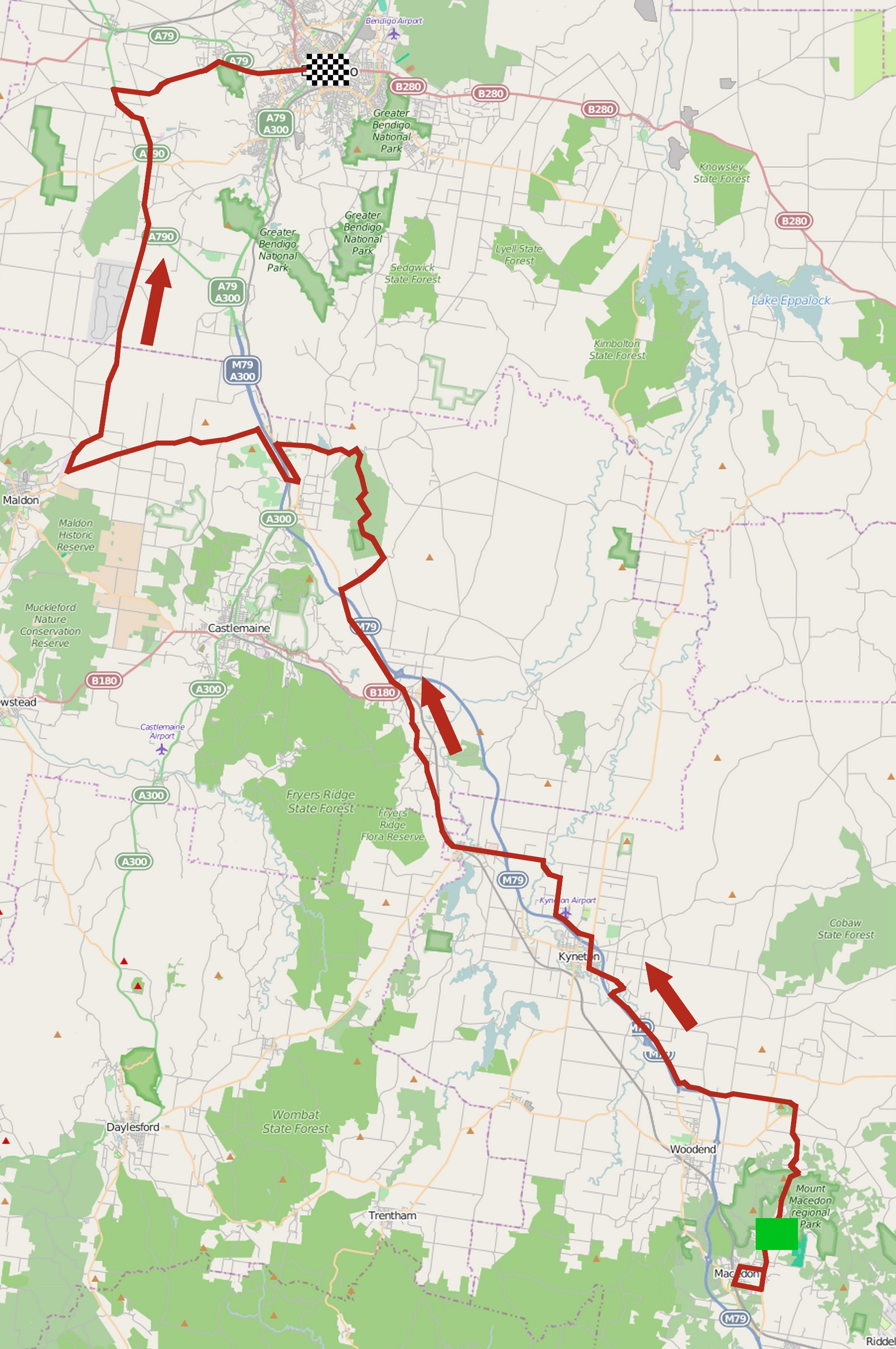 Parcours de la première étape du Herald Sun Tour 2015. This map may be incomplete, and may contain errors. Don't rely solely on it for navigation.